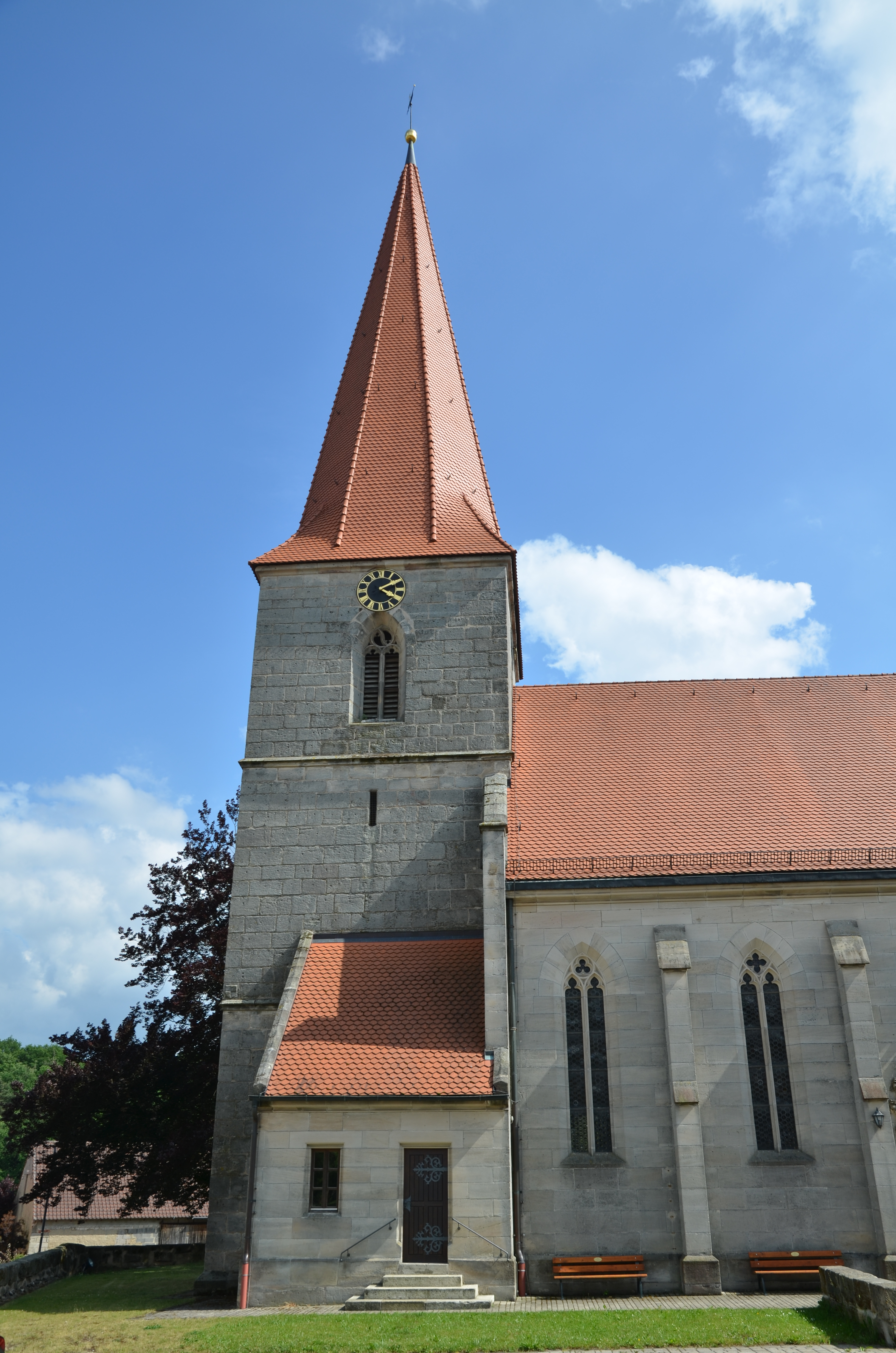 evang.-luth Kirche St. Peter und Paul in Kirchfarrnbach